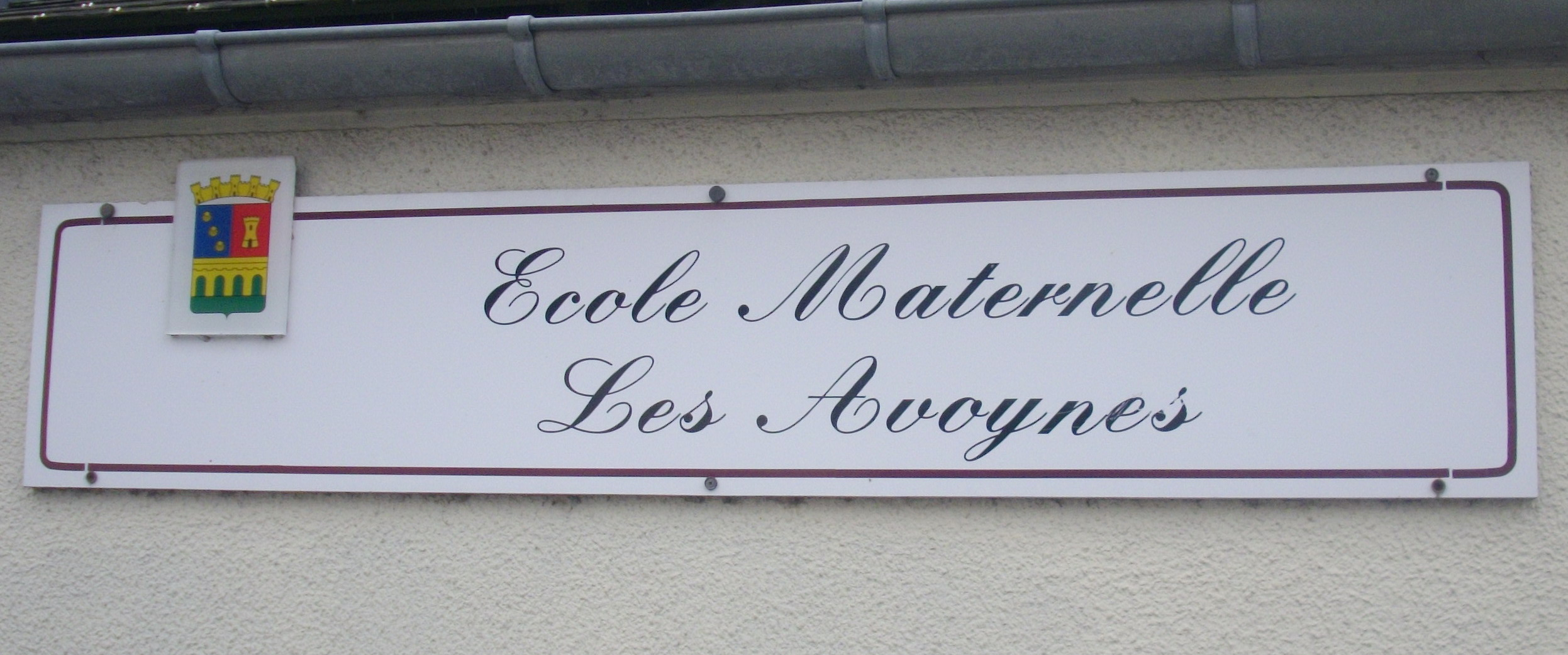 Pancarte à l'entrée de l'école maternelle des Avoynes à Equeurdreville-Hainneville.